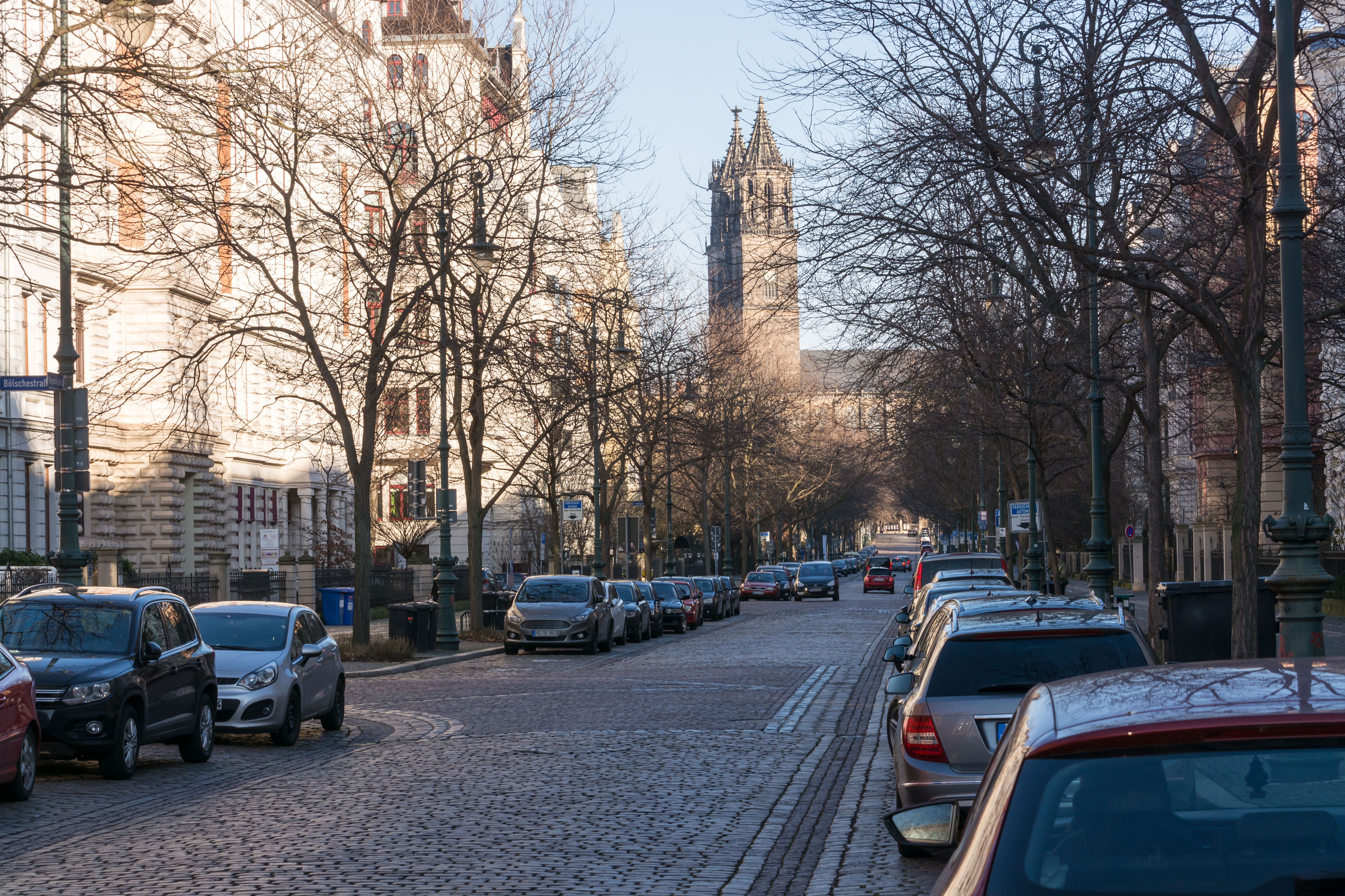 Straßenzug Hegelstraße in Magdeburg-Altstadt. This is a photograph of an architectural monument.It is on the list of cultural monuments of Magdeburg